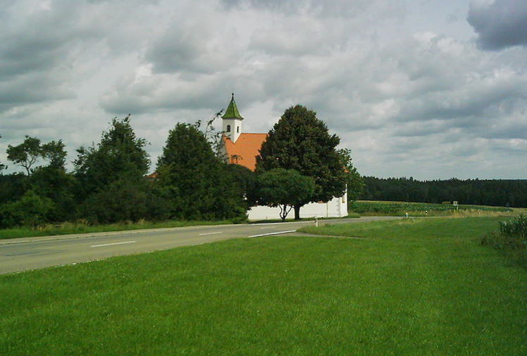 St. Anna Kapelle bei Steinhausen an der Rottum